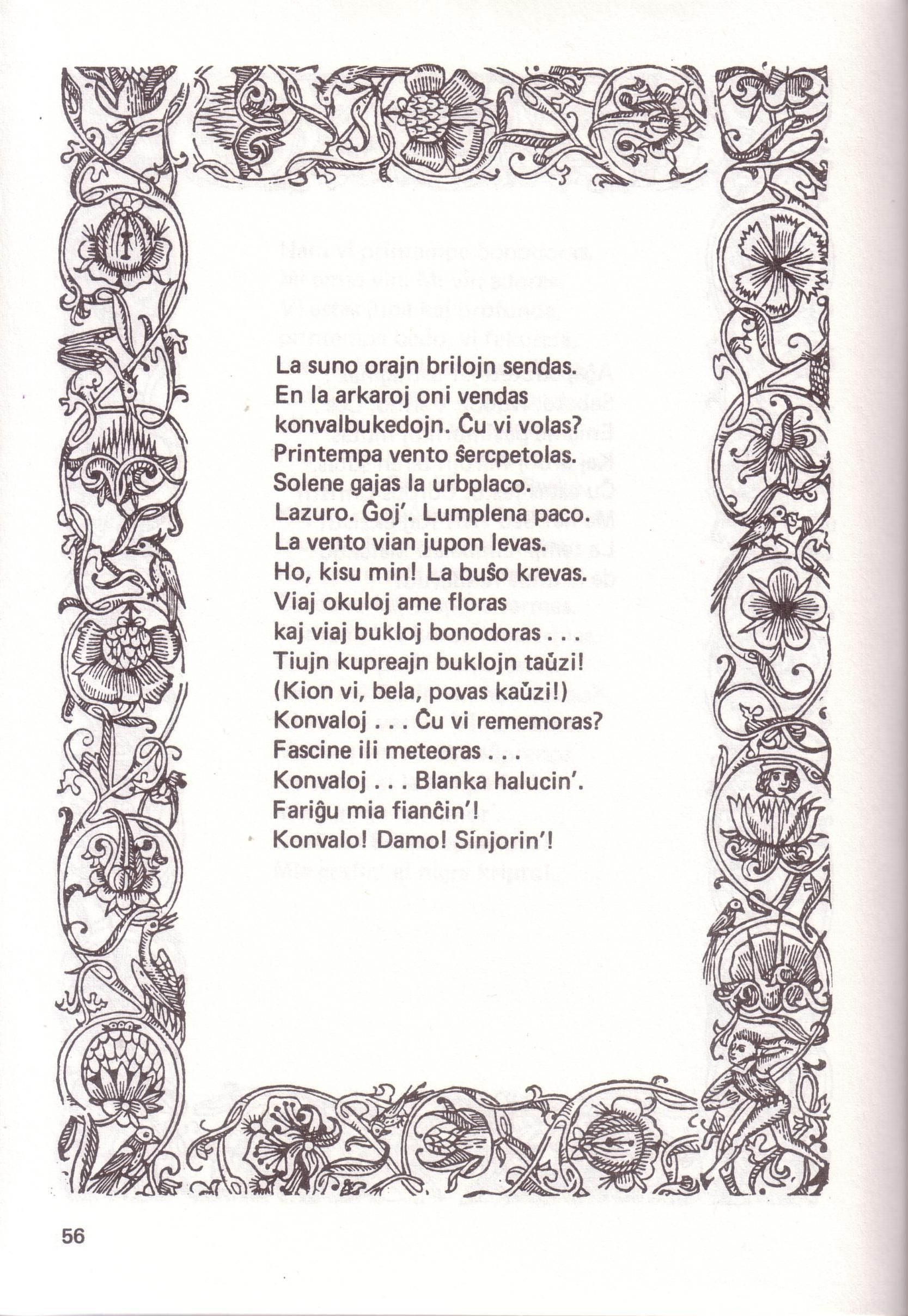 Cxiu pagxo kaj poeziajxo de la verko aperas tiele ornamita